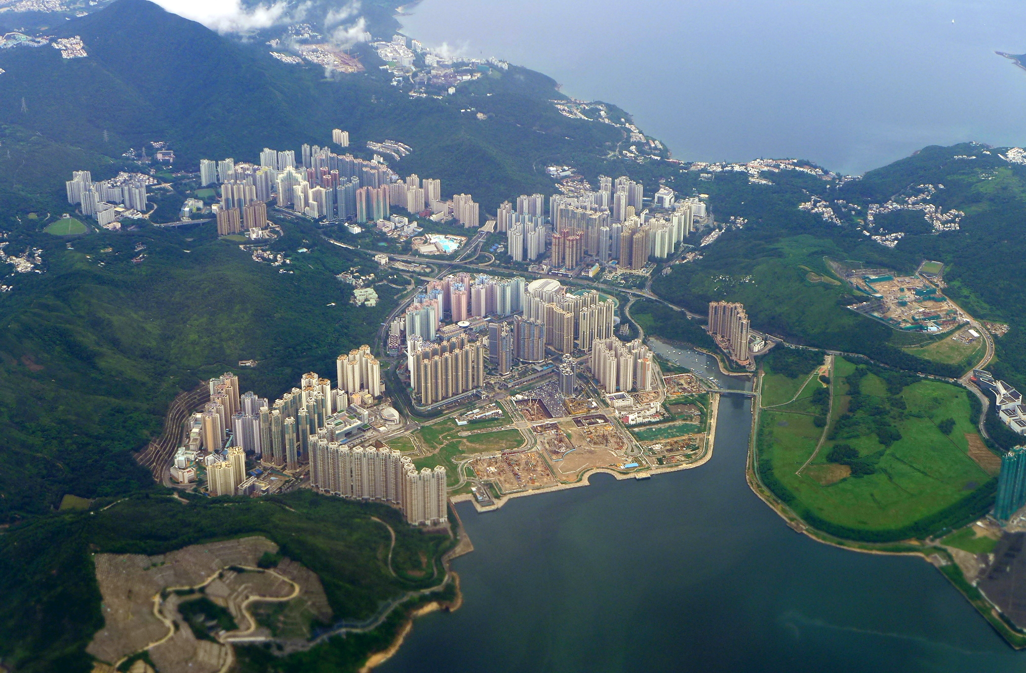 Tseung Kwan O 將軍澳